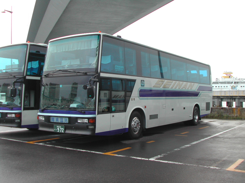 青南観光バス 旧ＪＲバス東北青森支店にて 右後方は青函連絡船